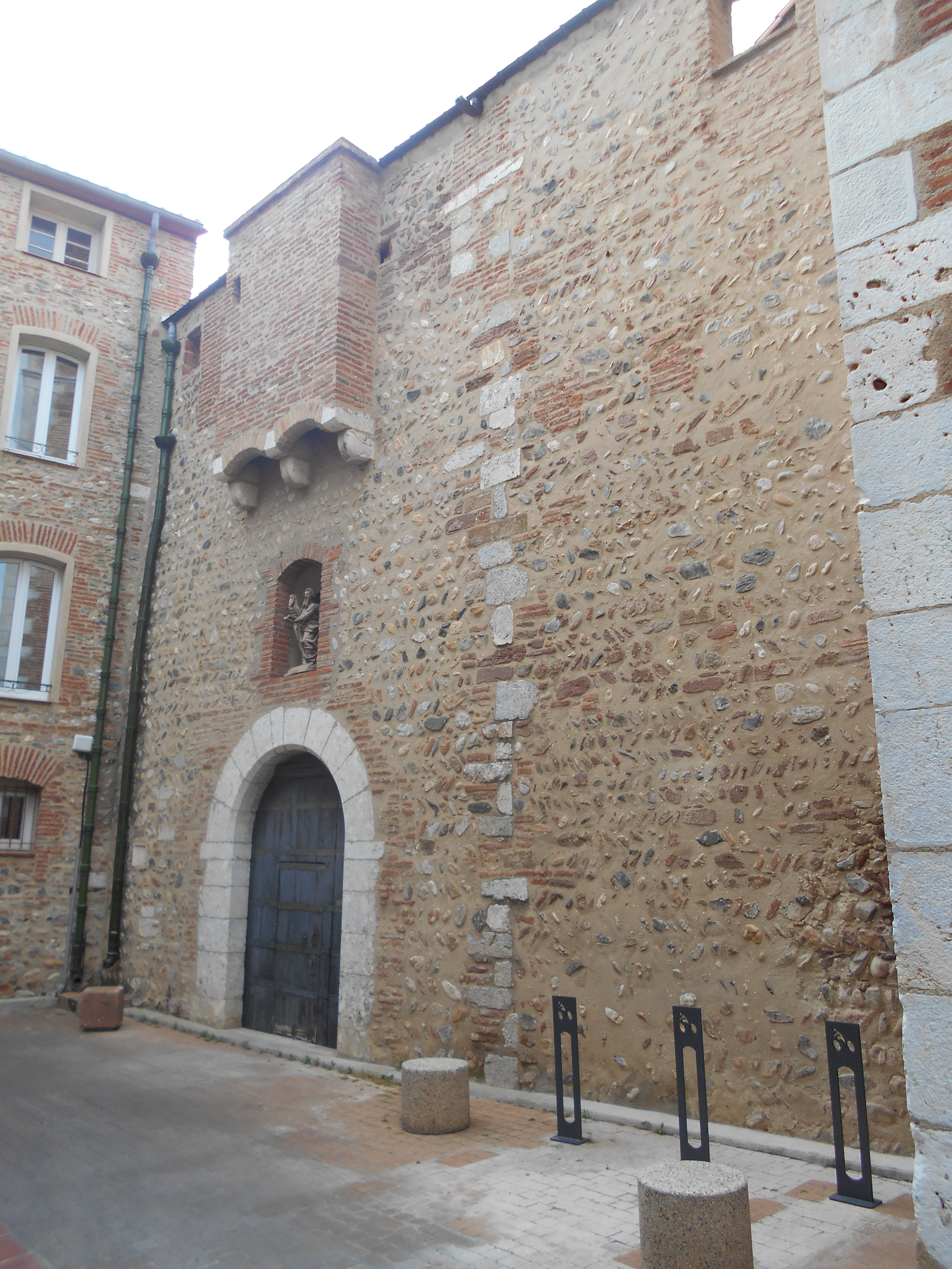 Sant Andreu de Ribesaltes, façana meridional.